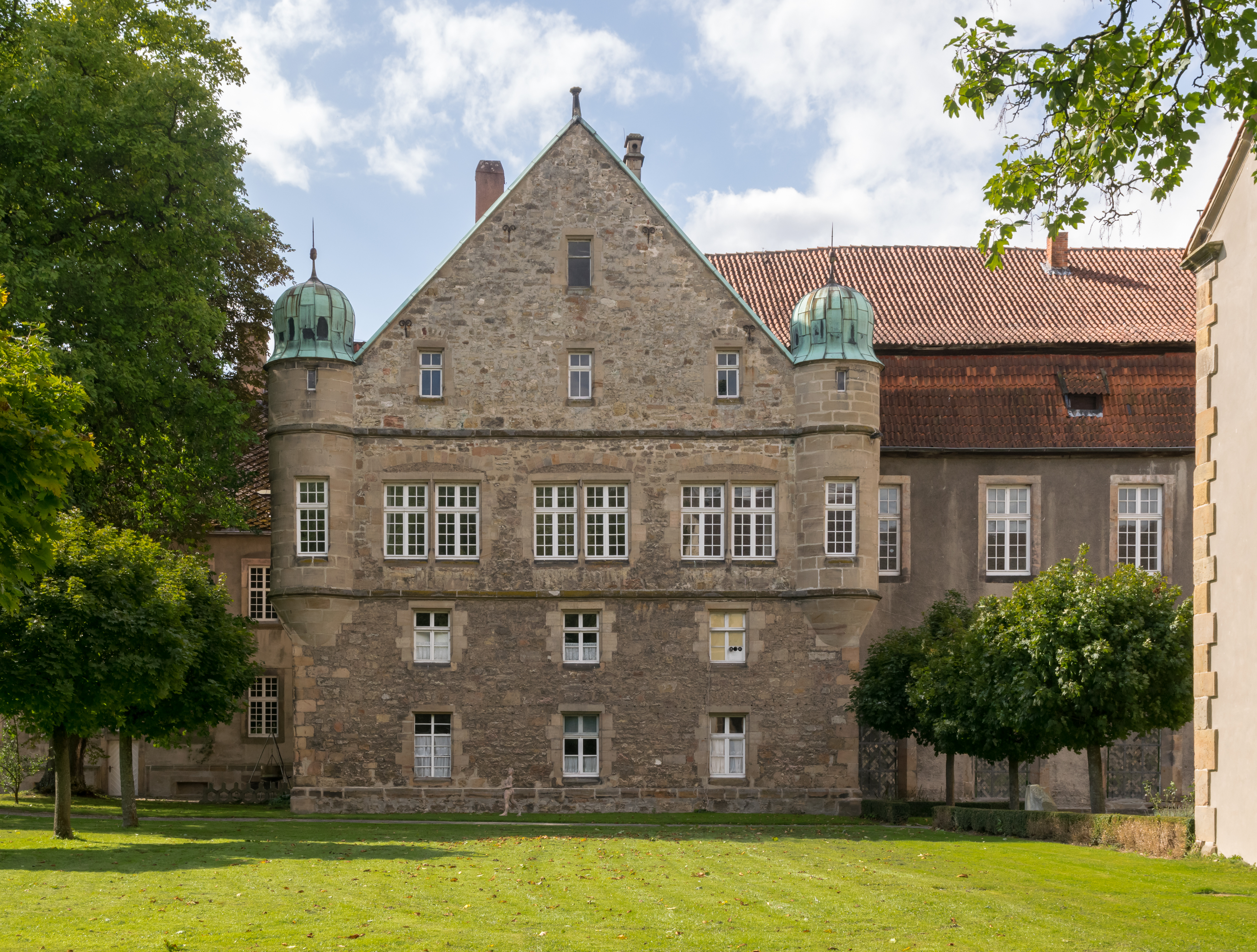 Kloster Willebadessen, ehemalige Abtei